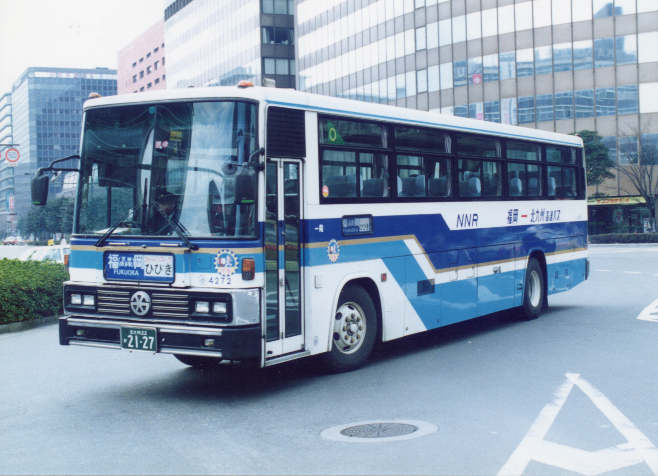 スーパーノンストップひびき号 博多駅交通センター（当時）入口にて撮影